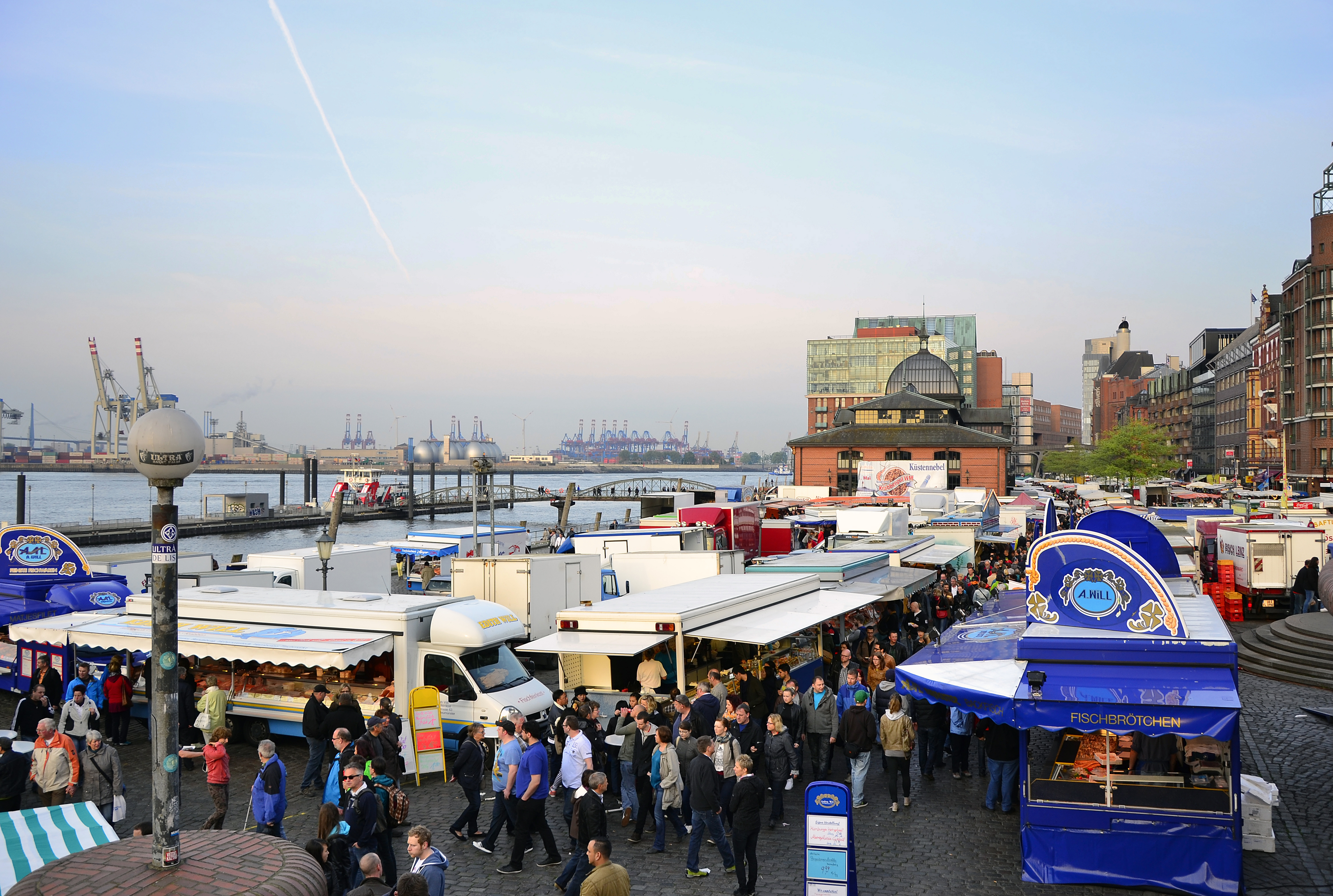 Blick auf dem Altonaer Fischmarkt, im April 2014